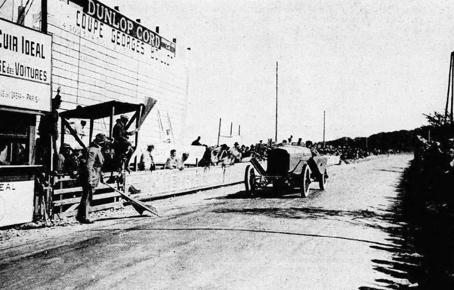 Léonce Garnier, arrivé premier de la Coupe Georges Boillot 1923 sur Hispano-Suiza H6 4.5L (en éffet, 8 litres dans la classe 4,5 litres plus)